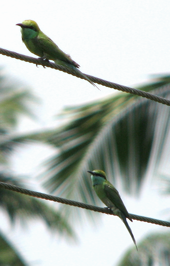 നാട്ടുവേലിതത്ത